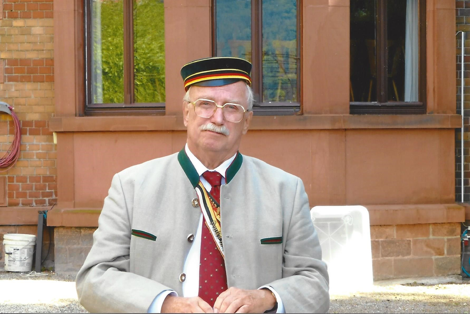 Porträtfotografie von Harald Seewann